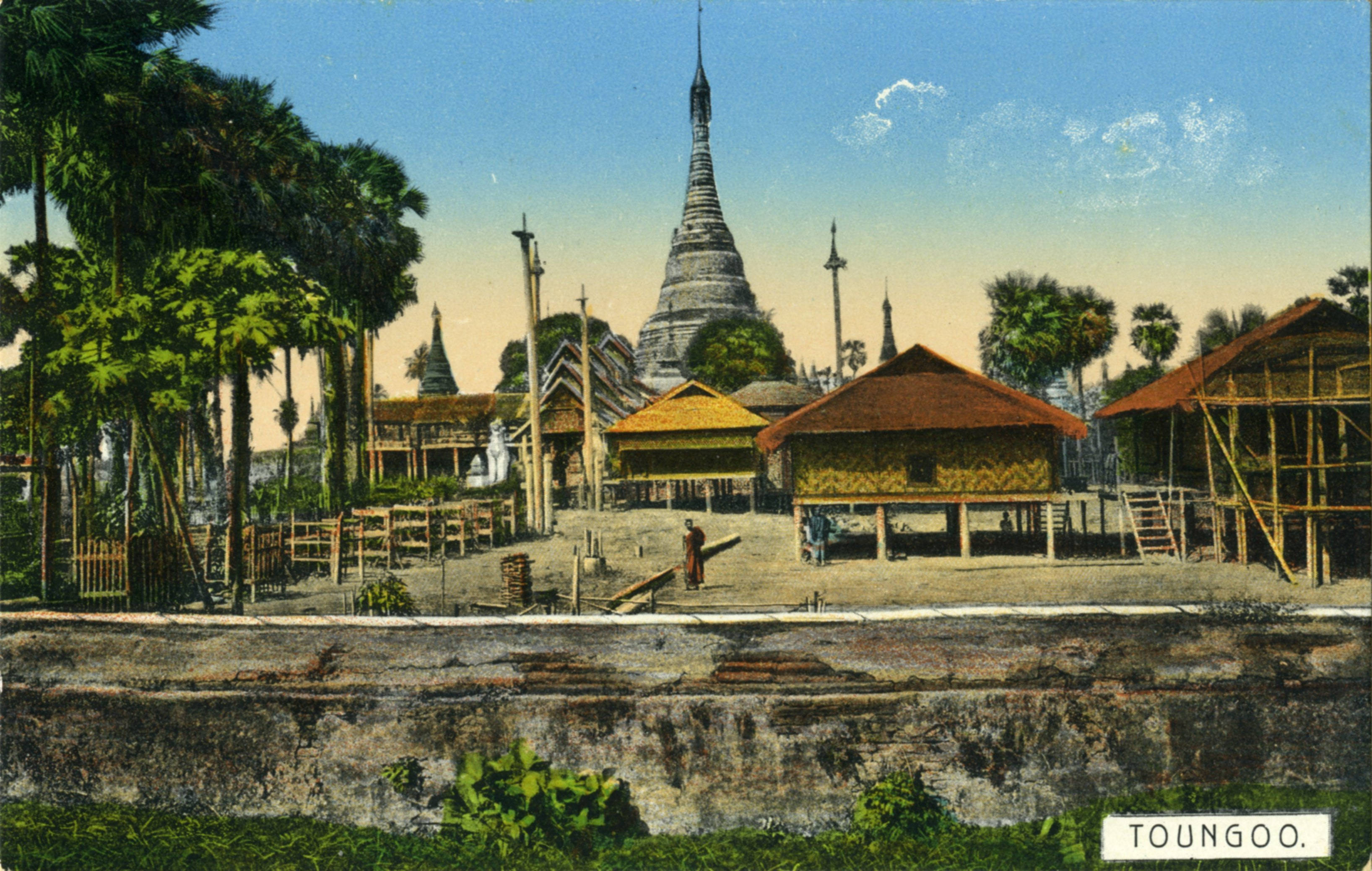 carte postale ancienne. Collection Ahuja. 1900